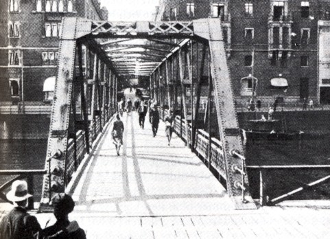 Riksbron i Stockholm före 1932